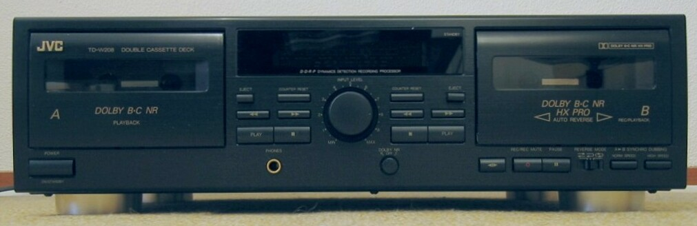 foto van cassettedeck